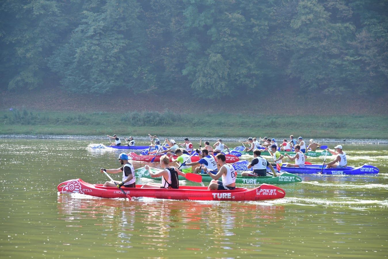 Перегони на каное Дністром